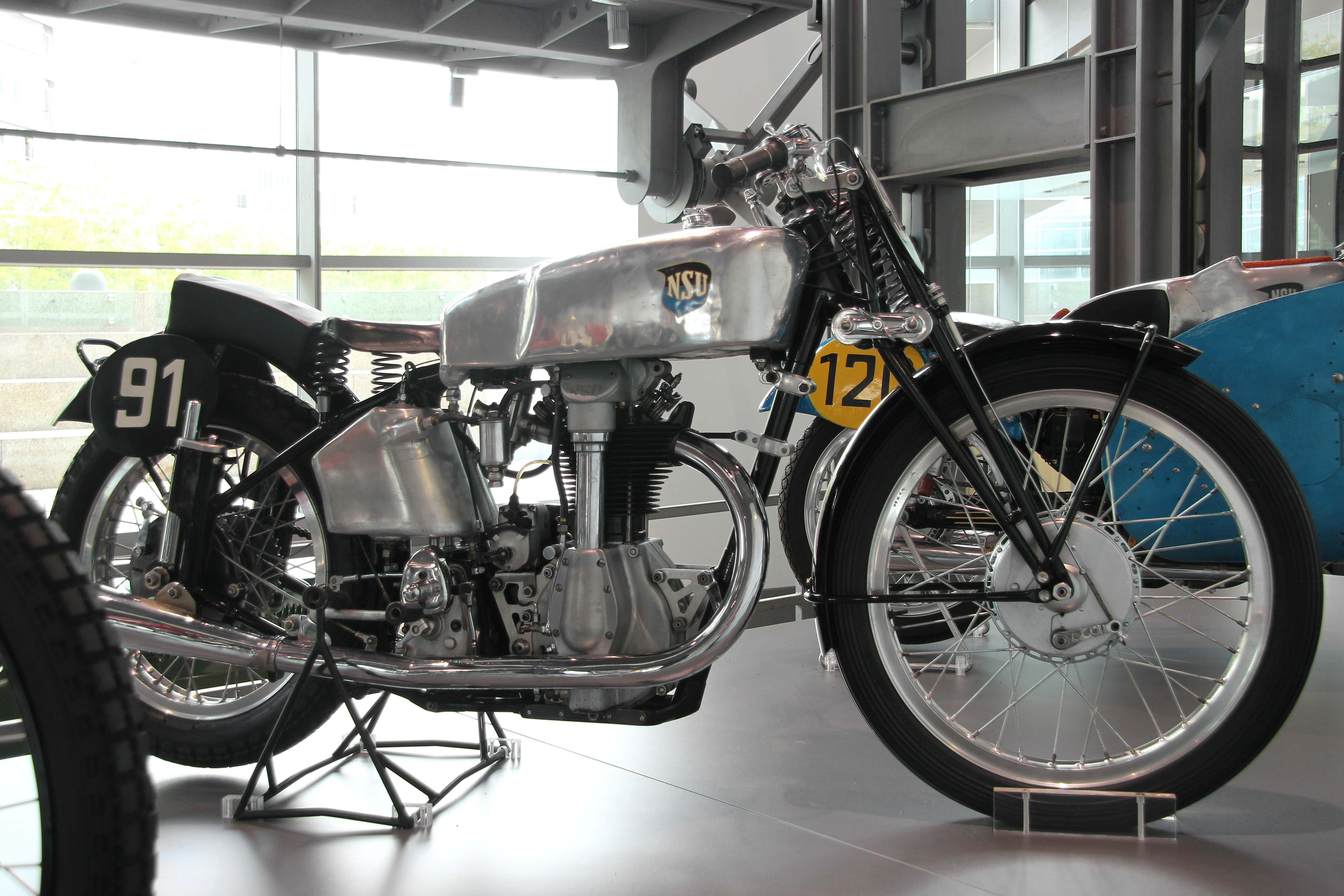 NSU 500 SS, Baujahr 1931, mit nachträglich eingebauter Hinterradfederung im museum mobile